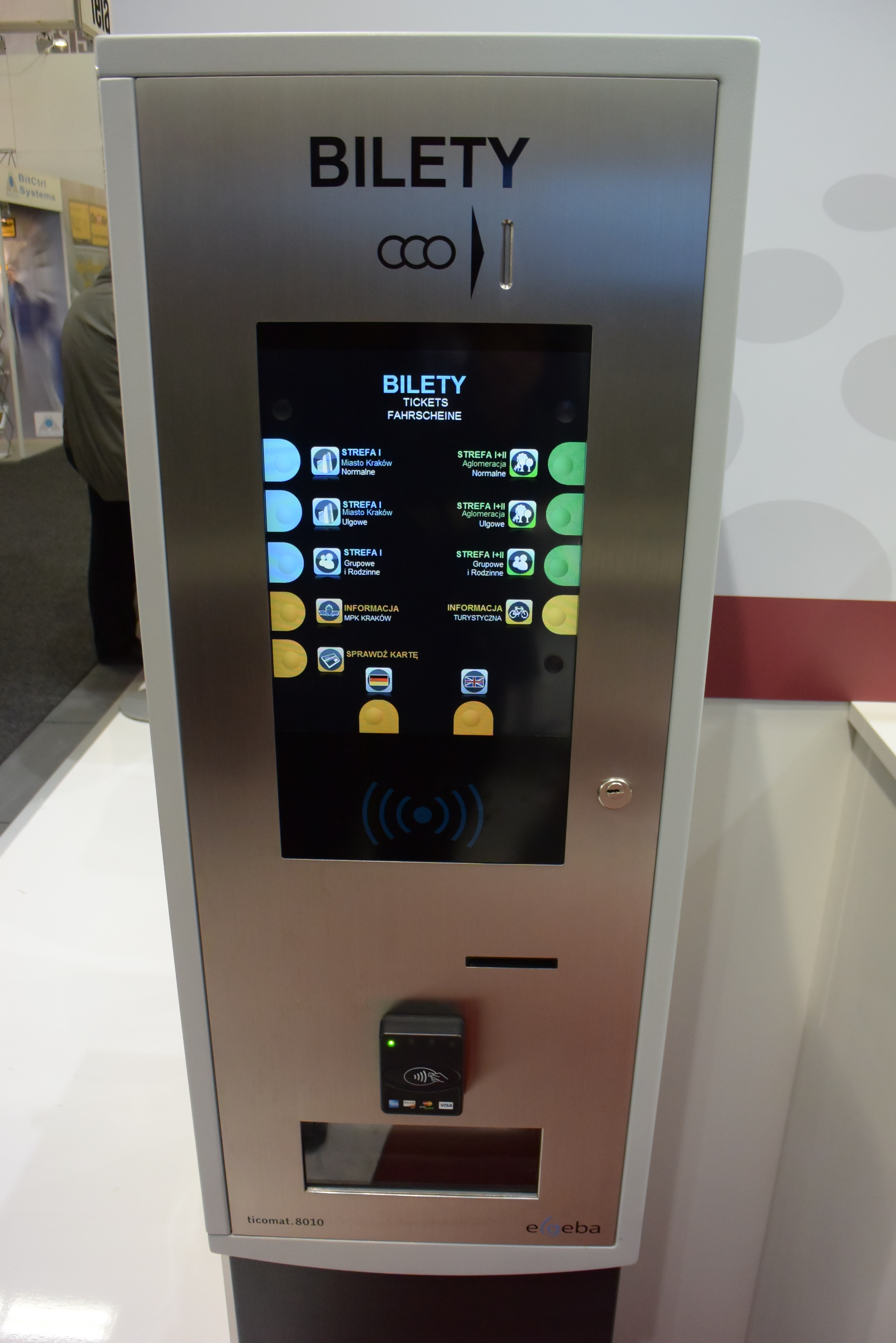 Biletomat elgeba ticomat.8010 podczas InnoTrans 2014